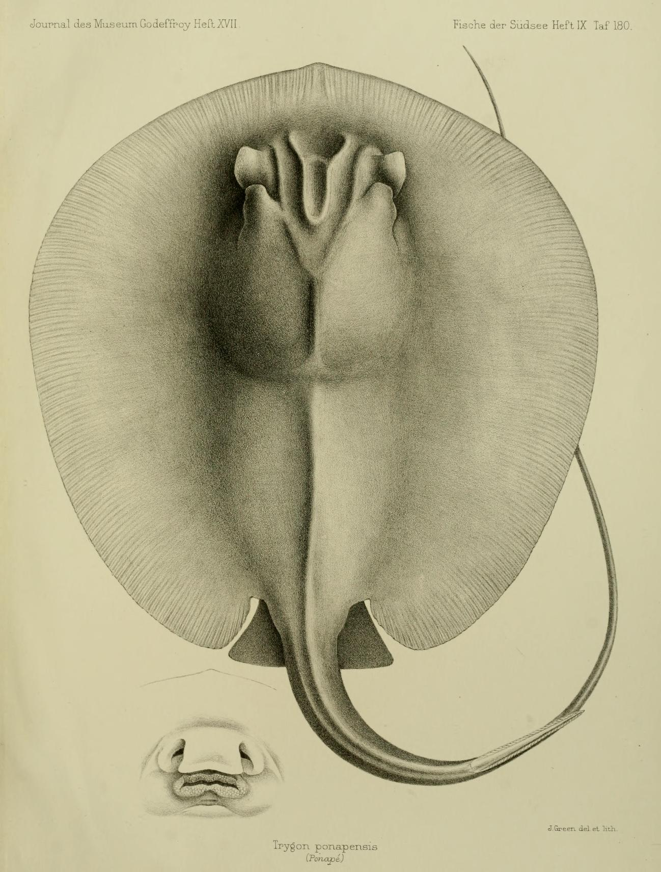 Himantura granulata syn. Trygon ponapensis